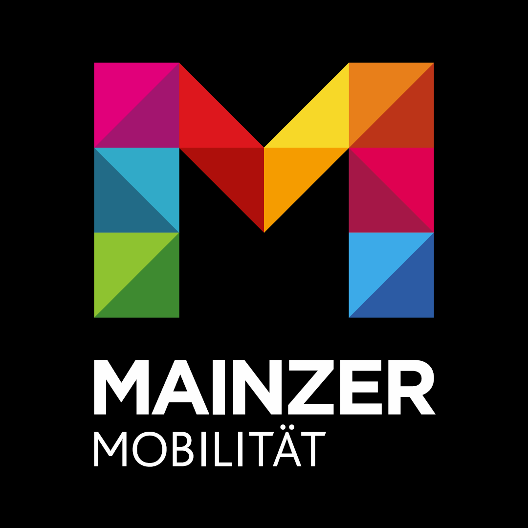 Logo der Mainzer Mobilität ab 2017, Variante auf schwarzem Hintergrund